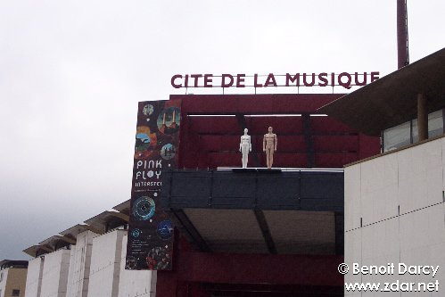 Photos de l'exposition "Pink Floyd Interstellar" à la Cité de la Musique (Porte de la Villette, Paris). Read the story at . Lire le compte-rendu de l'expo sur